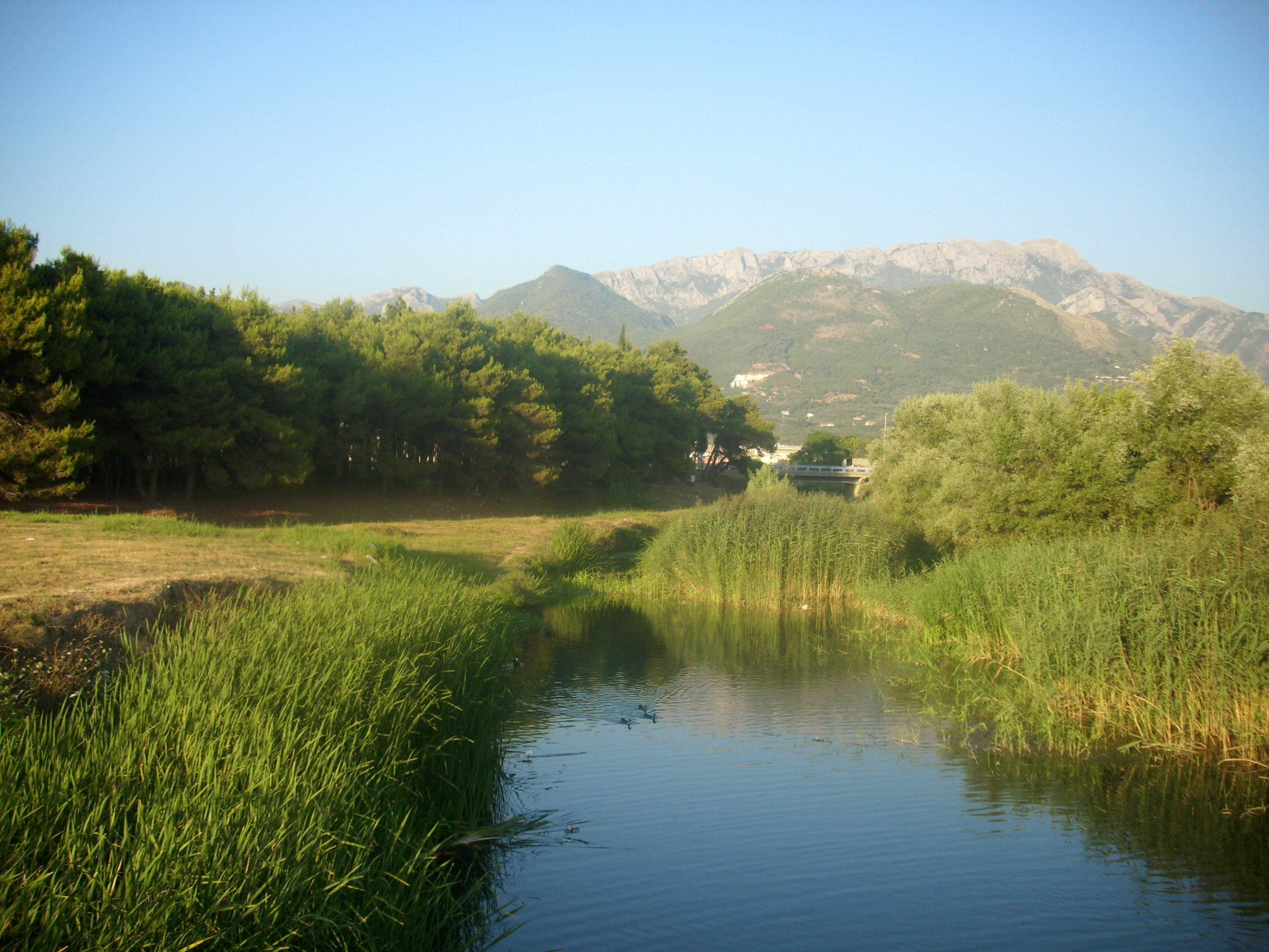 Reka Žečjeznica